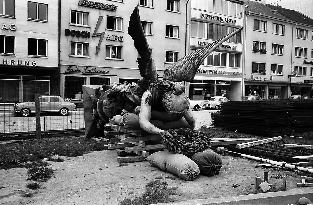 Die Siegesgöttin auf der Nase